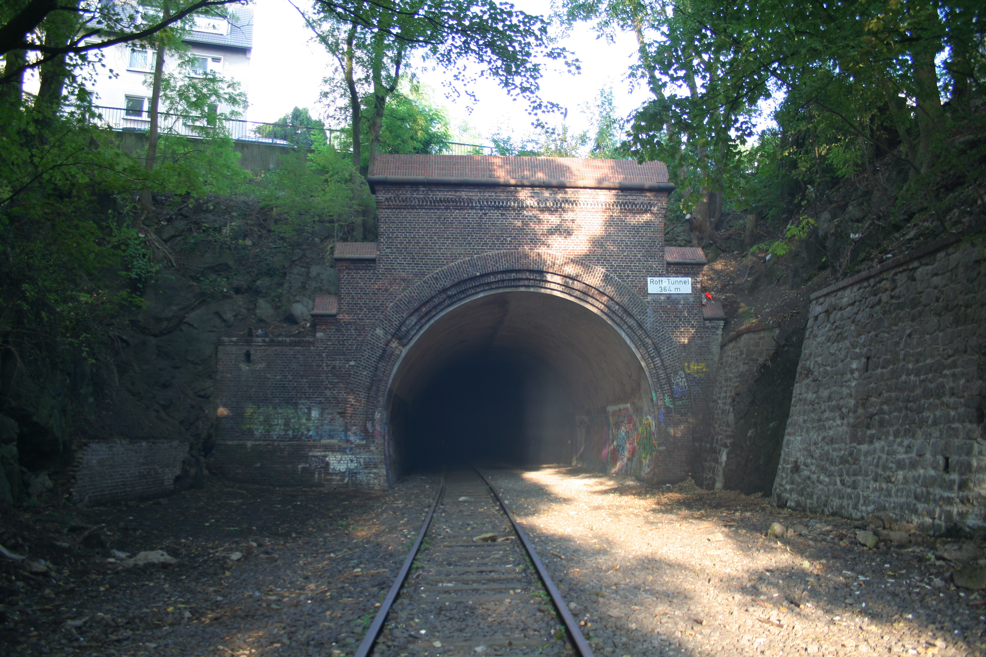 Stillgelegte Bahnstrecke Düsseldorf-Derendorf–Dortmund Süd in Wuppertal im Jahr 2009. Rott-Tunnel